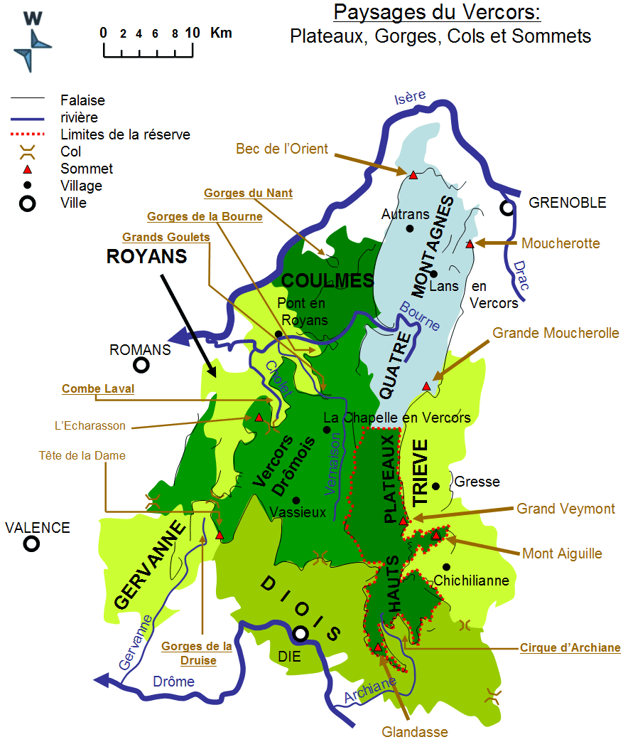 Une carte des différentes zones du Parc Régional du Vercors. Certains sommets, villages et cols sont indiqués, ainsi que certaines attractions touristiques comme des gorges, des plateaux, et des cirques. CETTE CARTE N'EST PAS EXHAUSTIVE